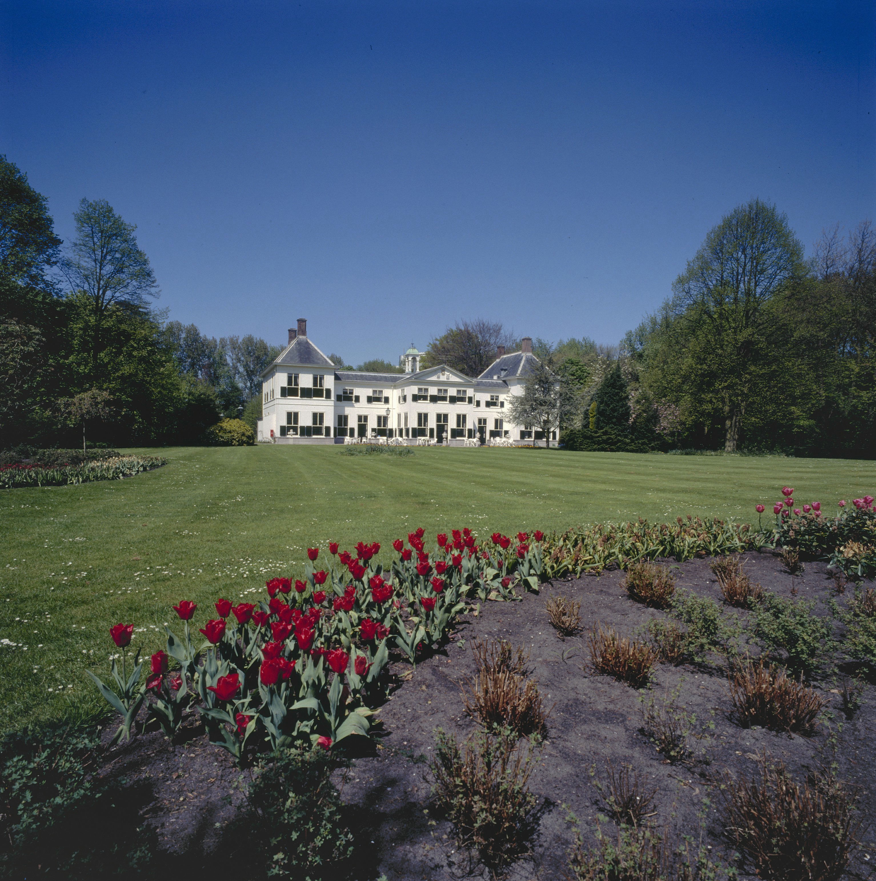 Zorgvliet: Overzicht achterzijde Catshuis, met tuin (opmerking: Gefotografeerd voor Kastelen en Buitenplaatsen in Zuid-Holland)